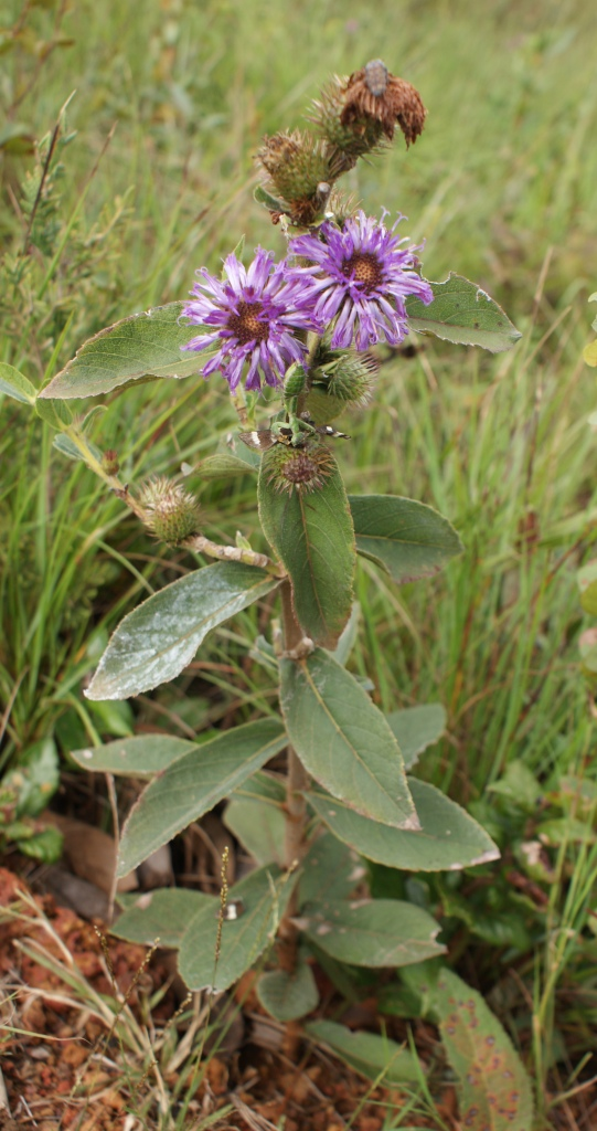 Lessingianthus roseus - ASTERACEAE Chapada Imperial - Brasília - Distrito Federal - Brasil.